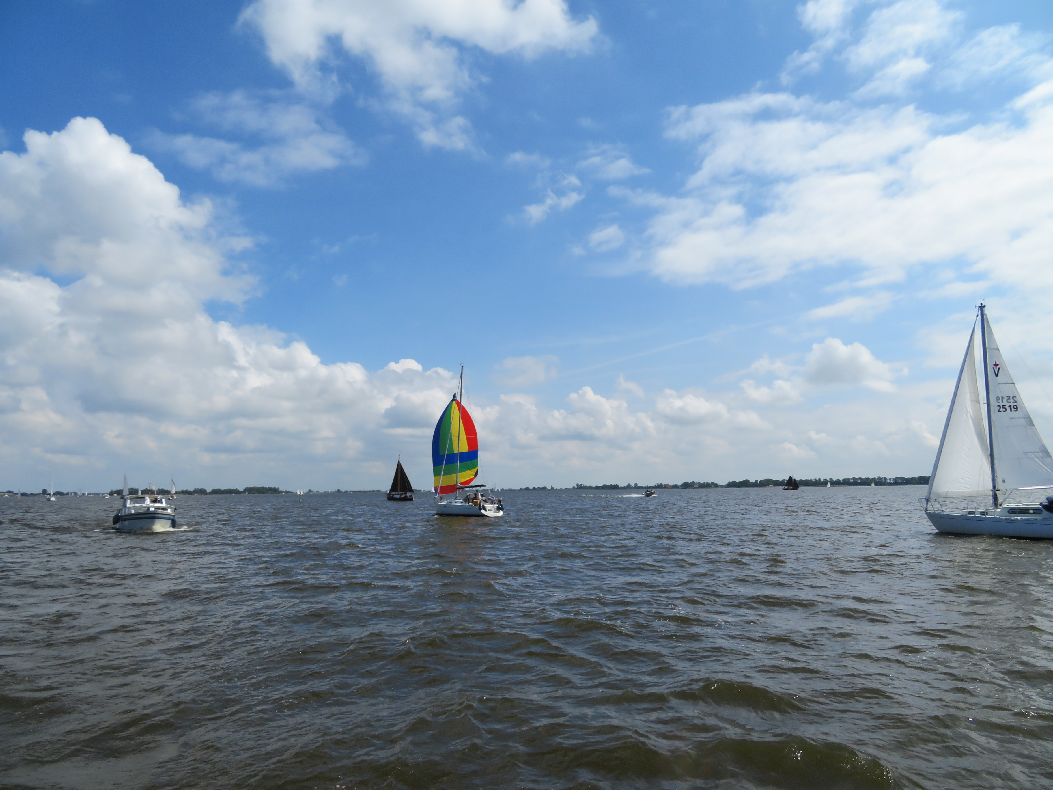 Heegermeer, Súdwest Fryslân, Friesland